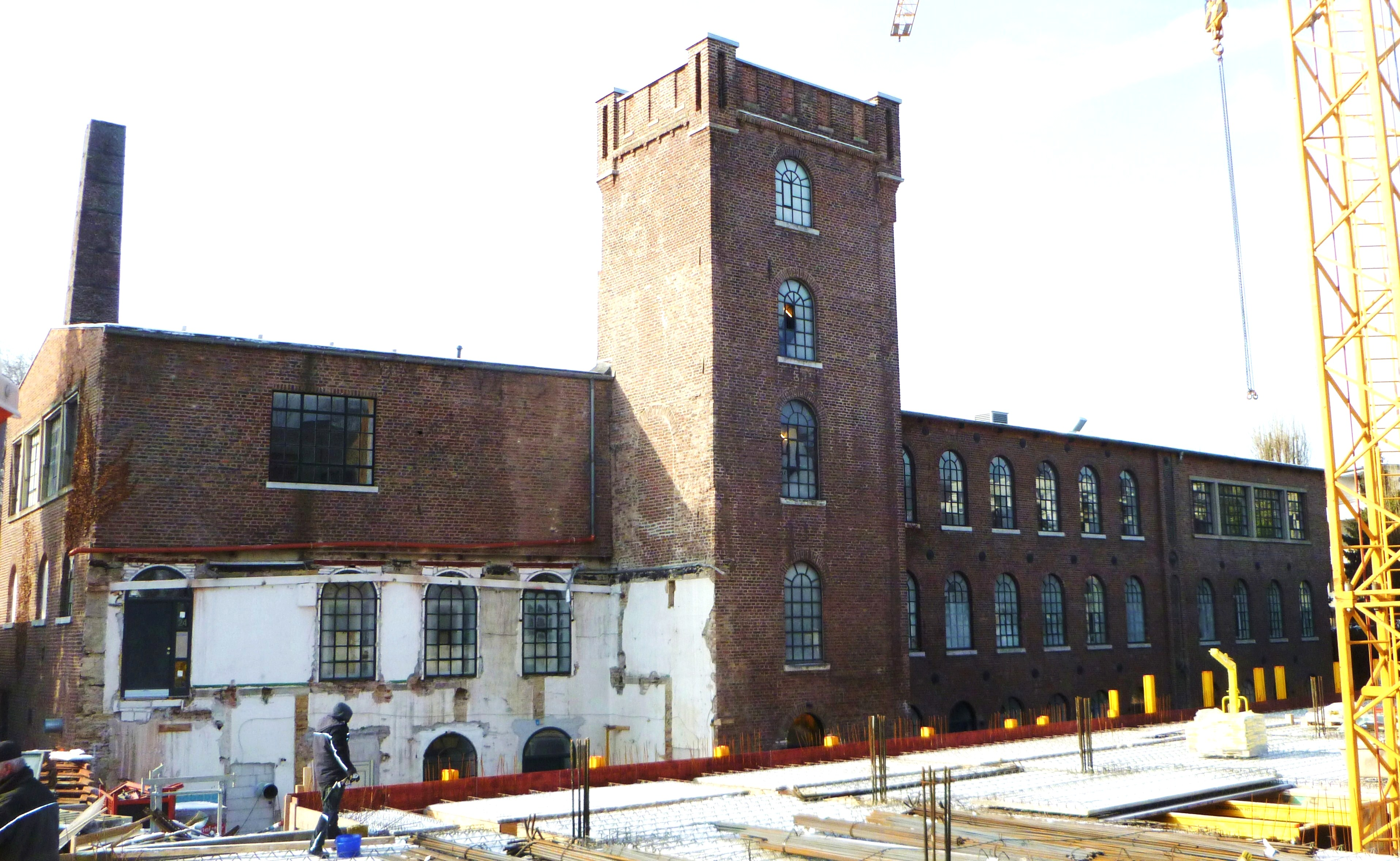 Baudenkmal in Aachen-Burtscheid